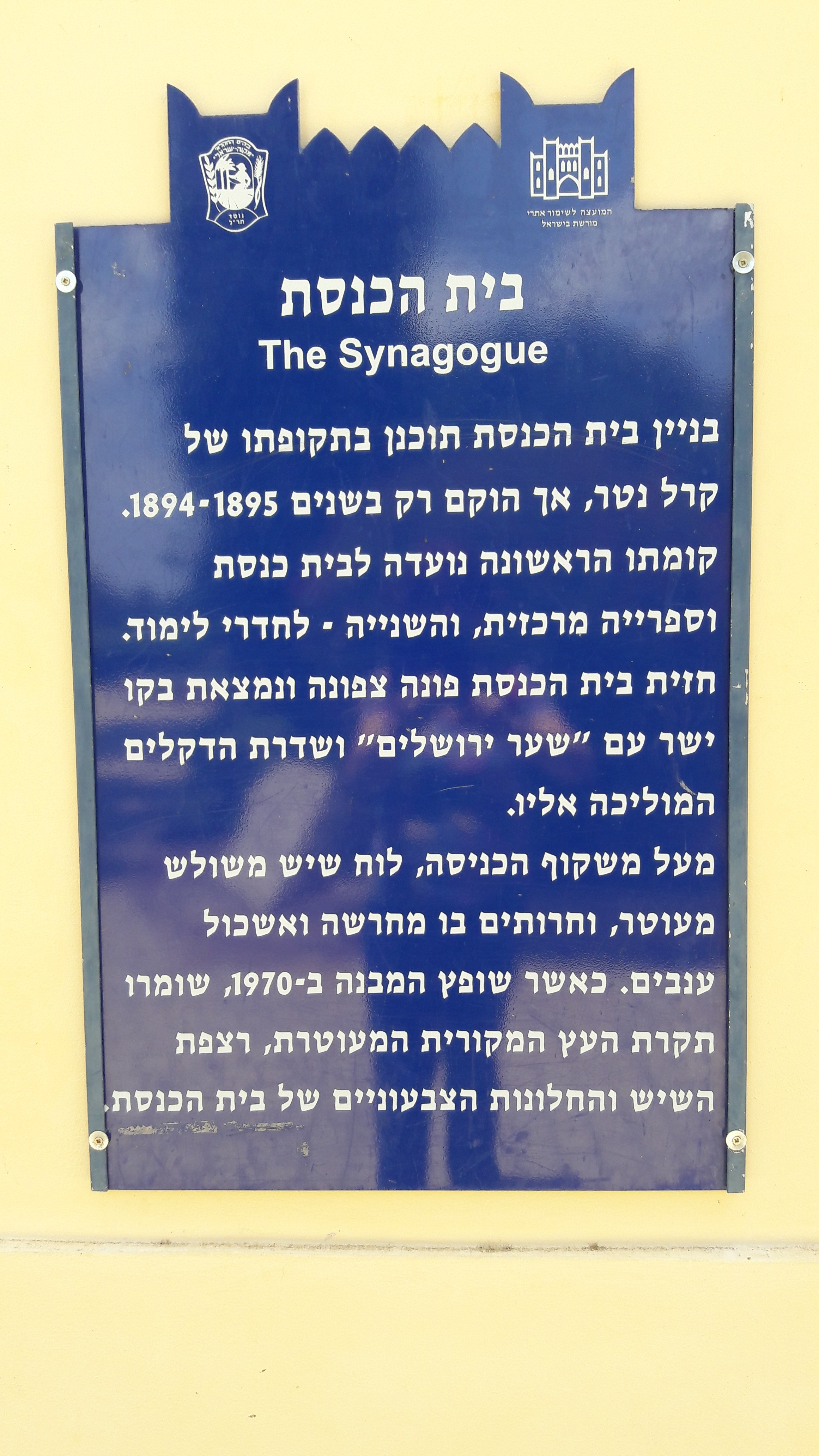 לוח של המועצה לשימור אתרים